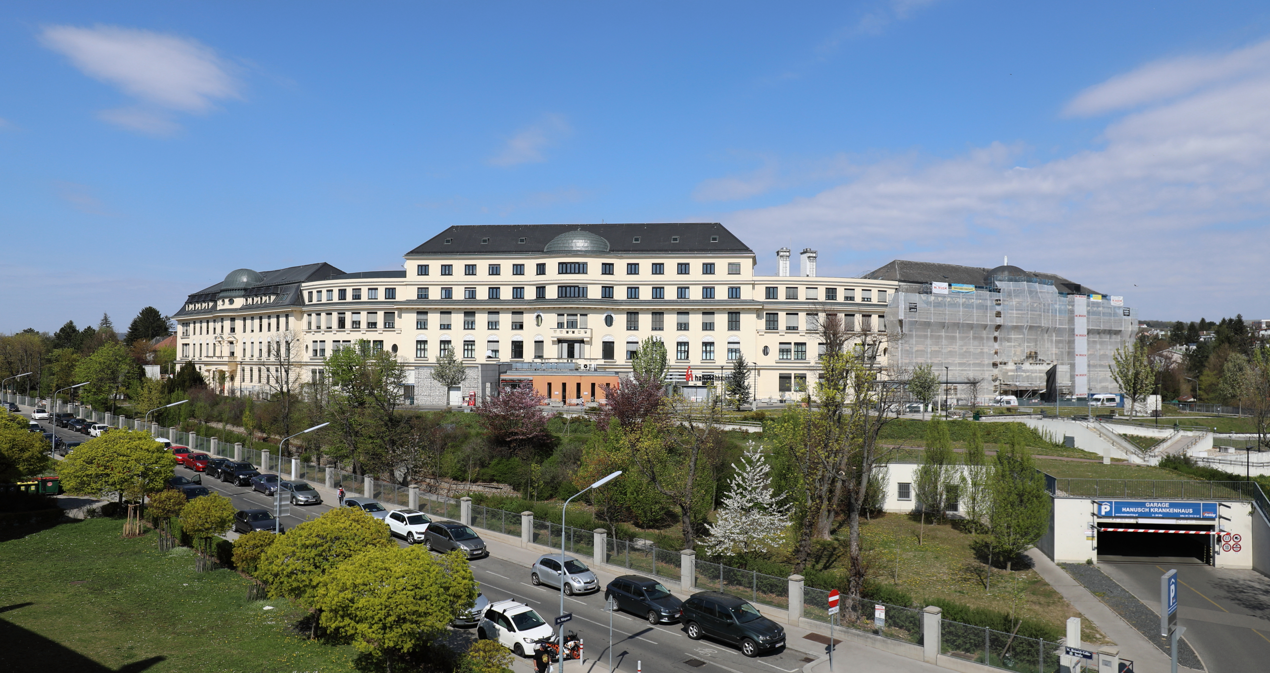 Südostansicht des Hanusch-Krankenhauses im 14. Wiener Gemeindebezirk Penzing.Als Militärspital ab 1914 nach Plänen von Hans Schmid und Hermann Aichinger durch Karl Stigler und Alois Roux errichtet und am 28. September 1915 als k. k. Erzherzog-Rainer-Militärspital feierlich eröffnet. 1945 erfolge zu Ehren des Gewerkschafters und Sozialministers der 1. Republik Ferdinand Hanusch (1866–1923) die Umbenennung in Hanusch-Krankenhaus.